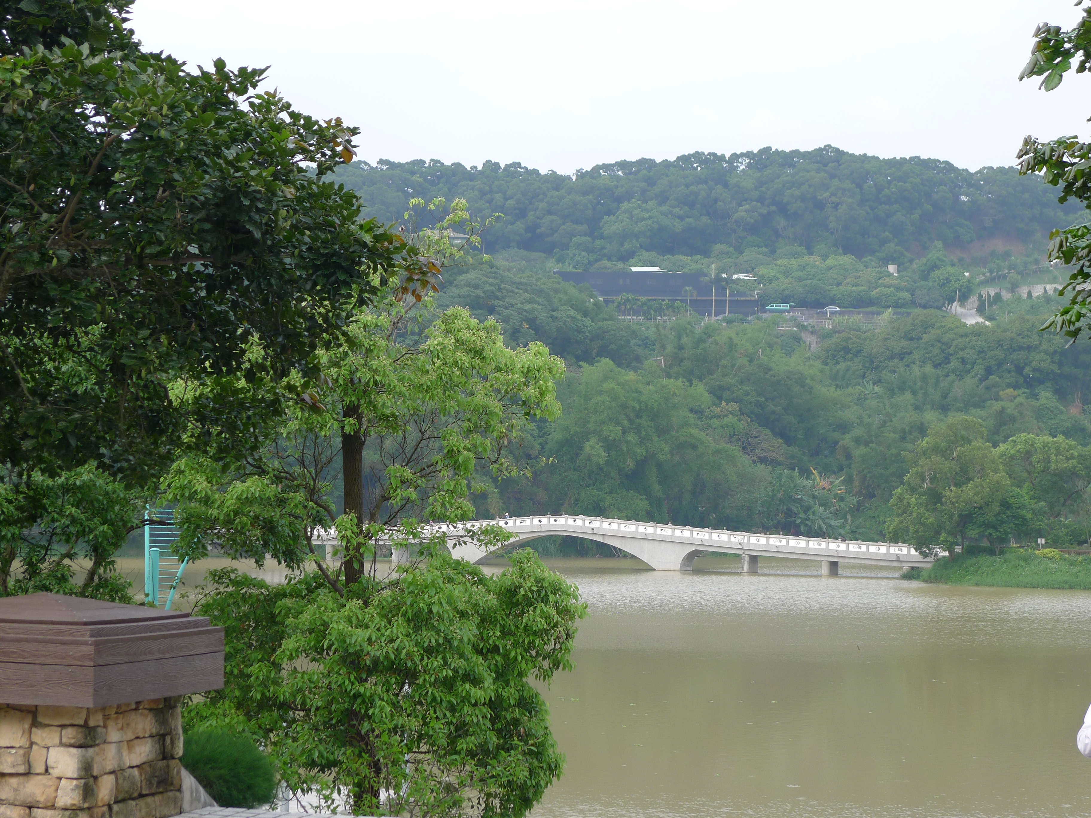 青草湖映月橋于飛島